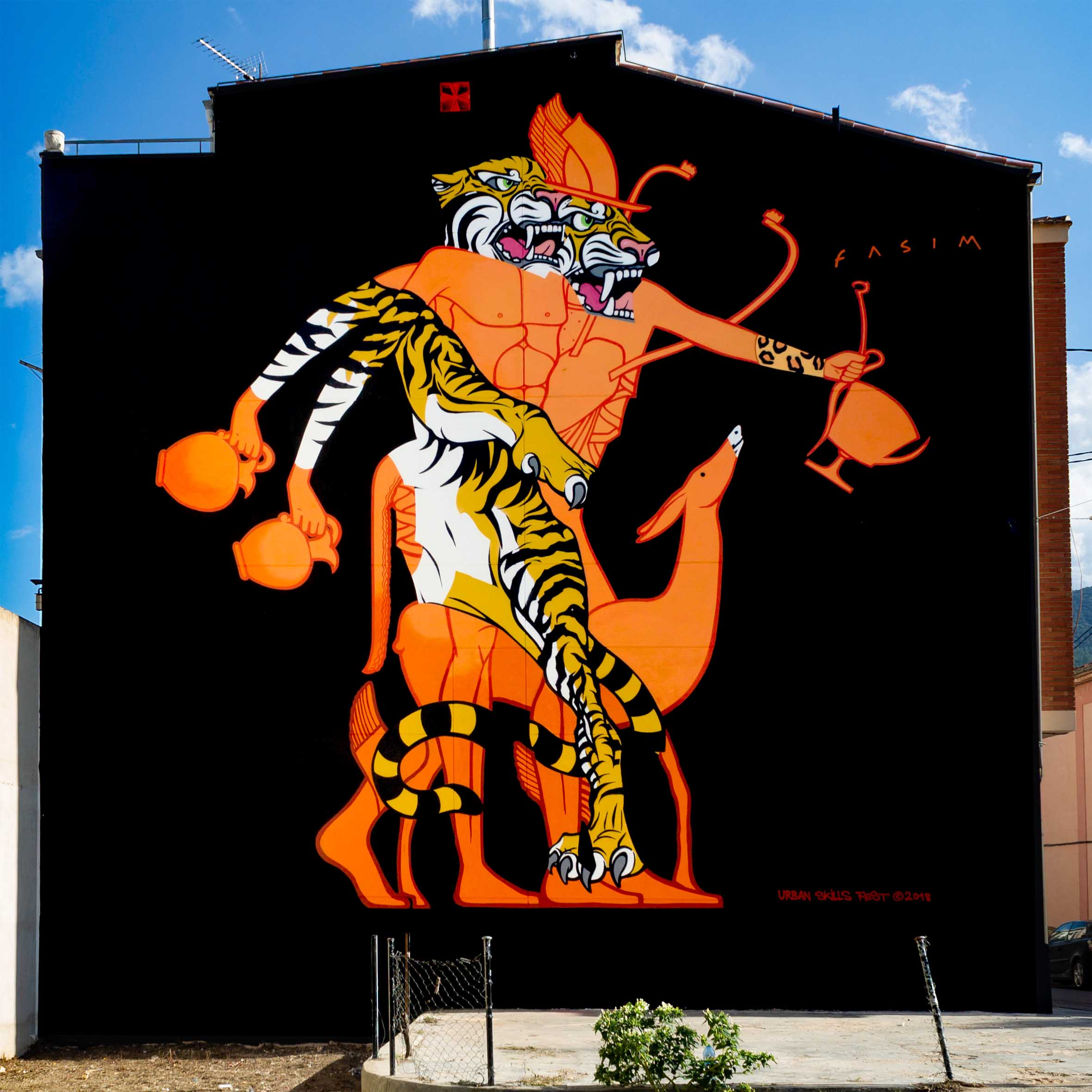 Graffiti mural realizado en el marco del Urban Skills Festival en la ciudad de Alcoy en el año 2018. Experimento de dibujo automático en pintura mural.